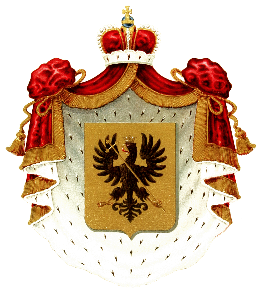 Герб князей Львовых